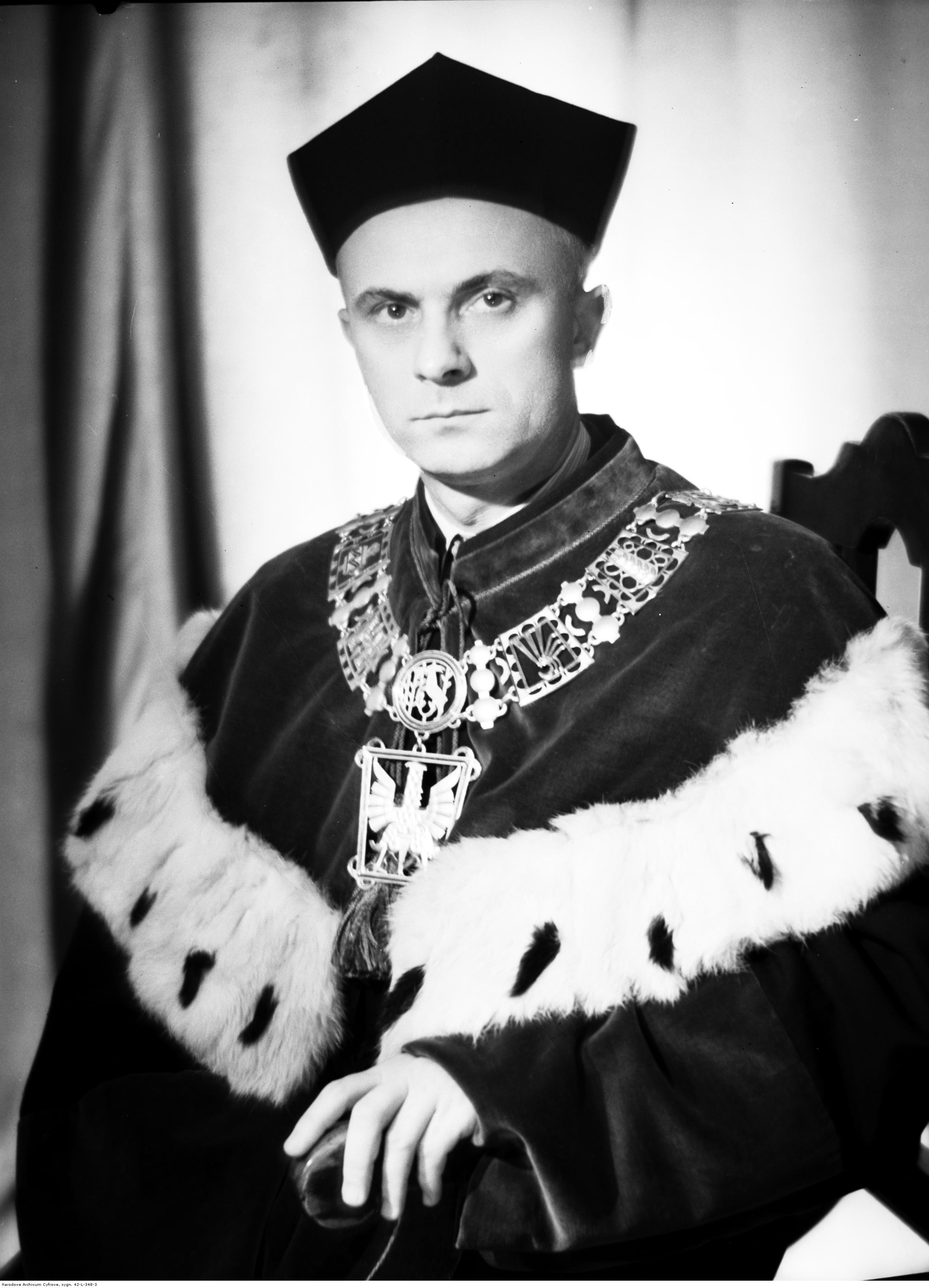 Kazimierz Myśliński (ur. 1916 w Wagowie, zm. 1999 w Lublinie) – polski historyk mediewista.